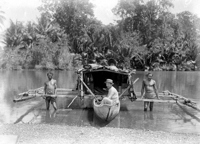 Negatief. Dat het niet alleen de oorspronkelijke Molukse bevolking was die zich in kleine bootjes met uitlegers of vlerken (vlerkprauw) waagde, mag uit deze foto blijken. De Chinese kleinhandelaar op de foto zal wel van Ternate gekomen zijn, waar in 1920 rond de 750 Chinezen woonden. We moeten aannemen dat de twee andere mannen op de foto zijn bemanning vormden en dat hij geen 'solozeiler' was. Door de aanwezigheid van de uitleggers was het een stabiele, zij het weinig comfortabele, manier van transport. Wel was het een zeer goedkope manier om allerlei (bos)producten van het eiland te exporteren en zo de Europese handelaar die zijn goederen per KPM-schip vervoerde er uit te concurreren. (P. Boomgaard, 2001). Een Chinese kleinhandelaar wordt door twee mannen geholpen bij het binnenhalen van de vlerkprauw op de Sagea-rivier, Halmahera